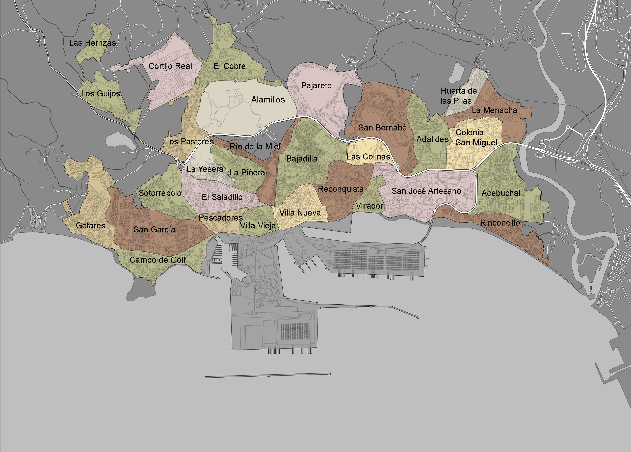 Mapa de las áreas homogéneas de la ciudad de Algeciras tomadas por el ayuntamiento de la ciudad como división no oficial.